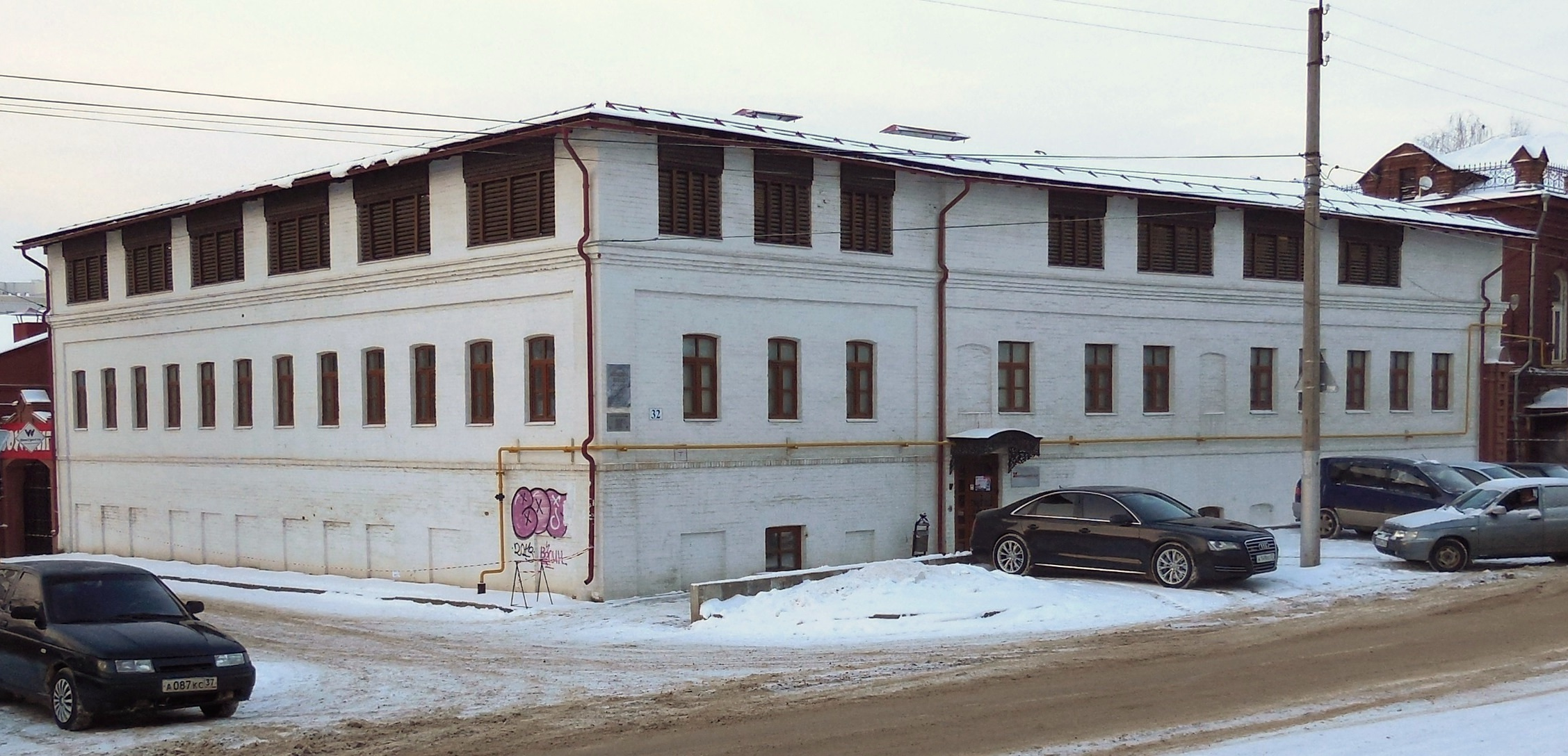 Набойный корпус усадьбы Я.Н.Фокина в г. Иваново (Советская ул., 32) Построен в конце XVIII - начале XIX в.